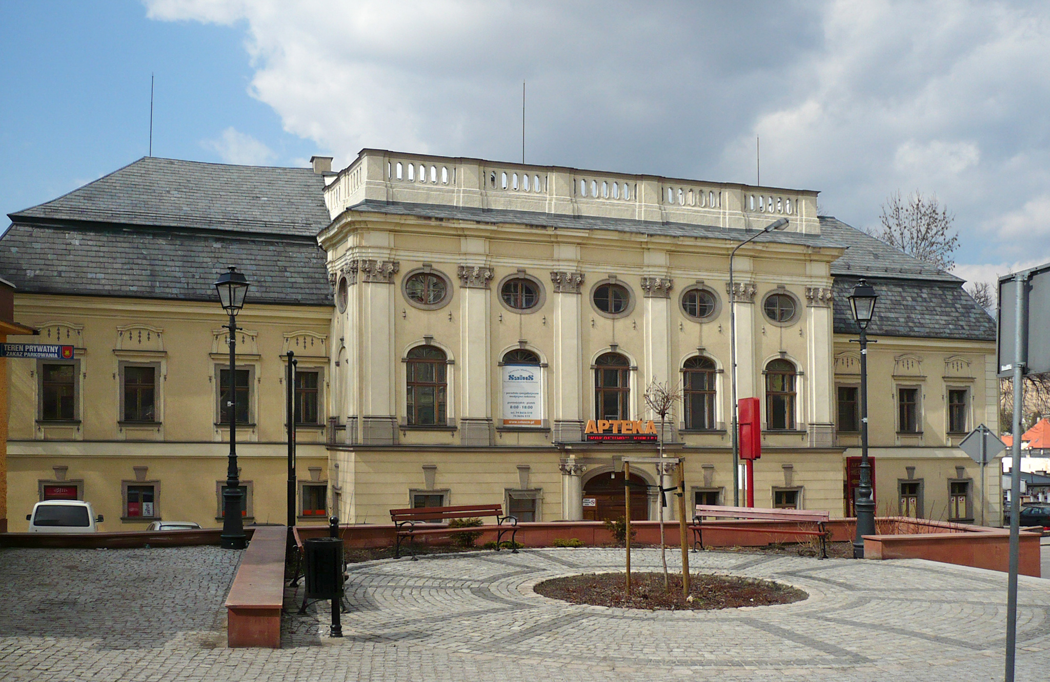 Nowa Ruda, ul. Piłsudskiego 2 - zamek Stillfriedów, obecnie biura, 1416, 1650, 1730 (zabytek nr A/935/1559 z 16.03.1966)